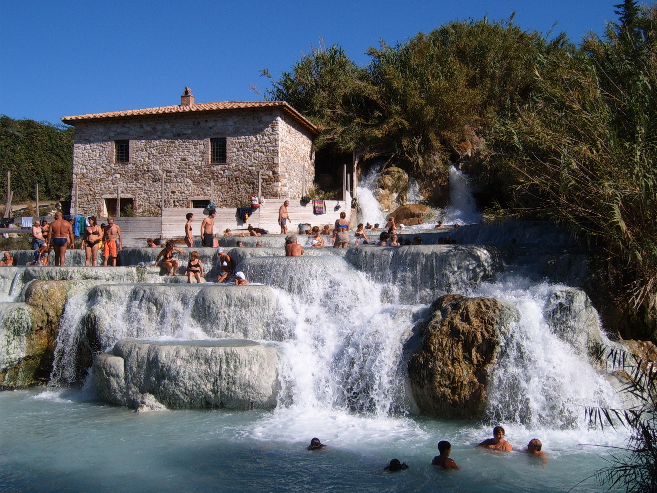 Cascate del Mulino, Saturnia, Maremma (Toscana, Italia)